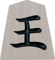 Pièce d'un jeu de Shogi: le roi "régnant". (Variante avec un seul caractère - kanji - représenté)